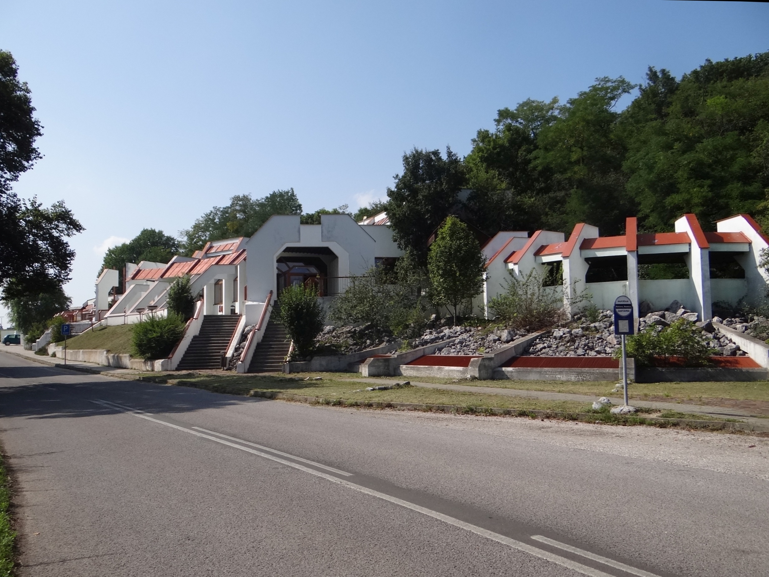 Jaskyňa Domica